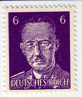 britische Kriegspropagandafälschung (statt Hitler im Original hier Himmler als Motiv)